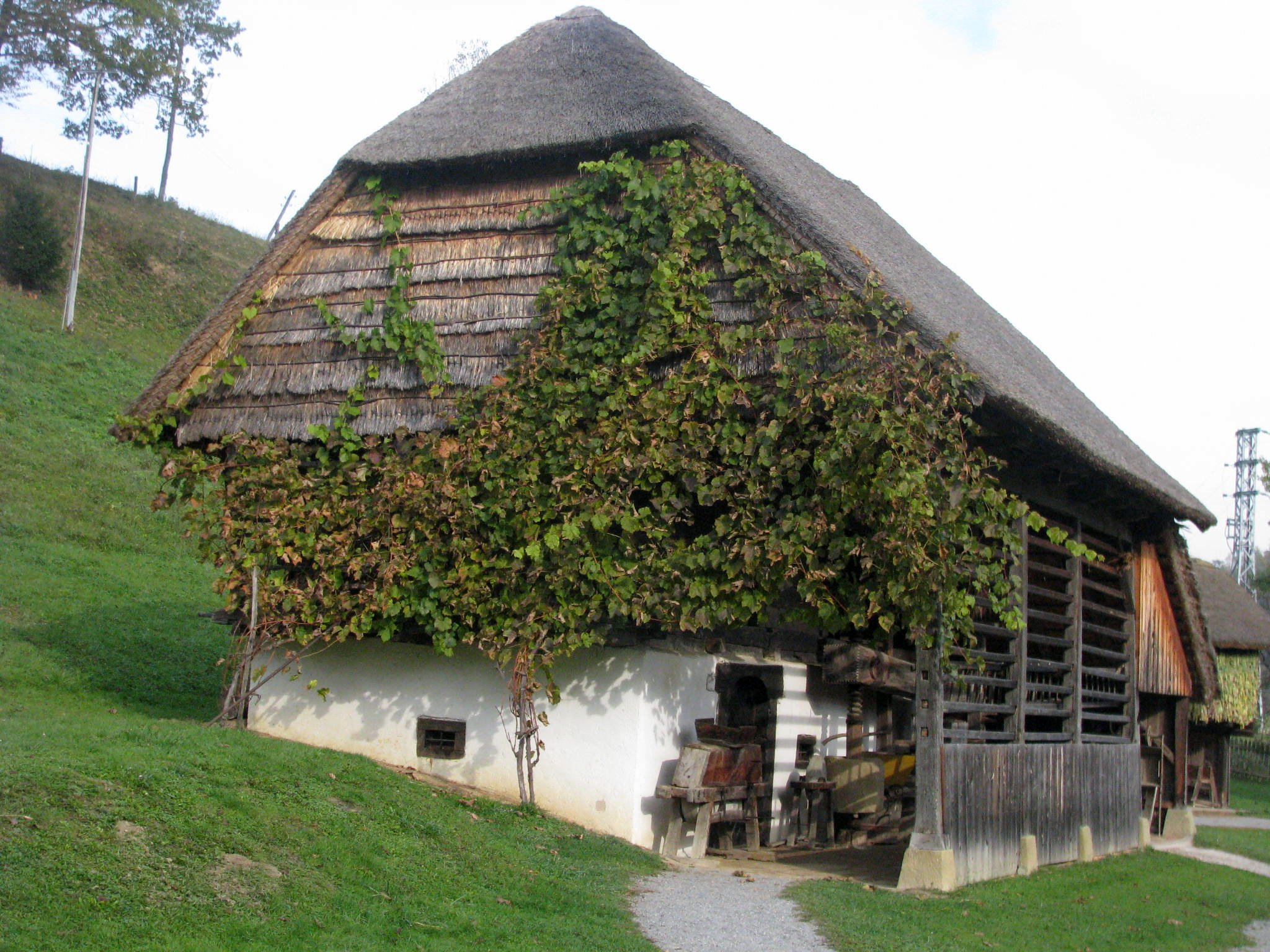 Open air museum, Rogatec, Slovenia